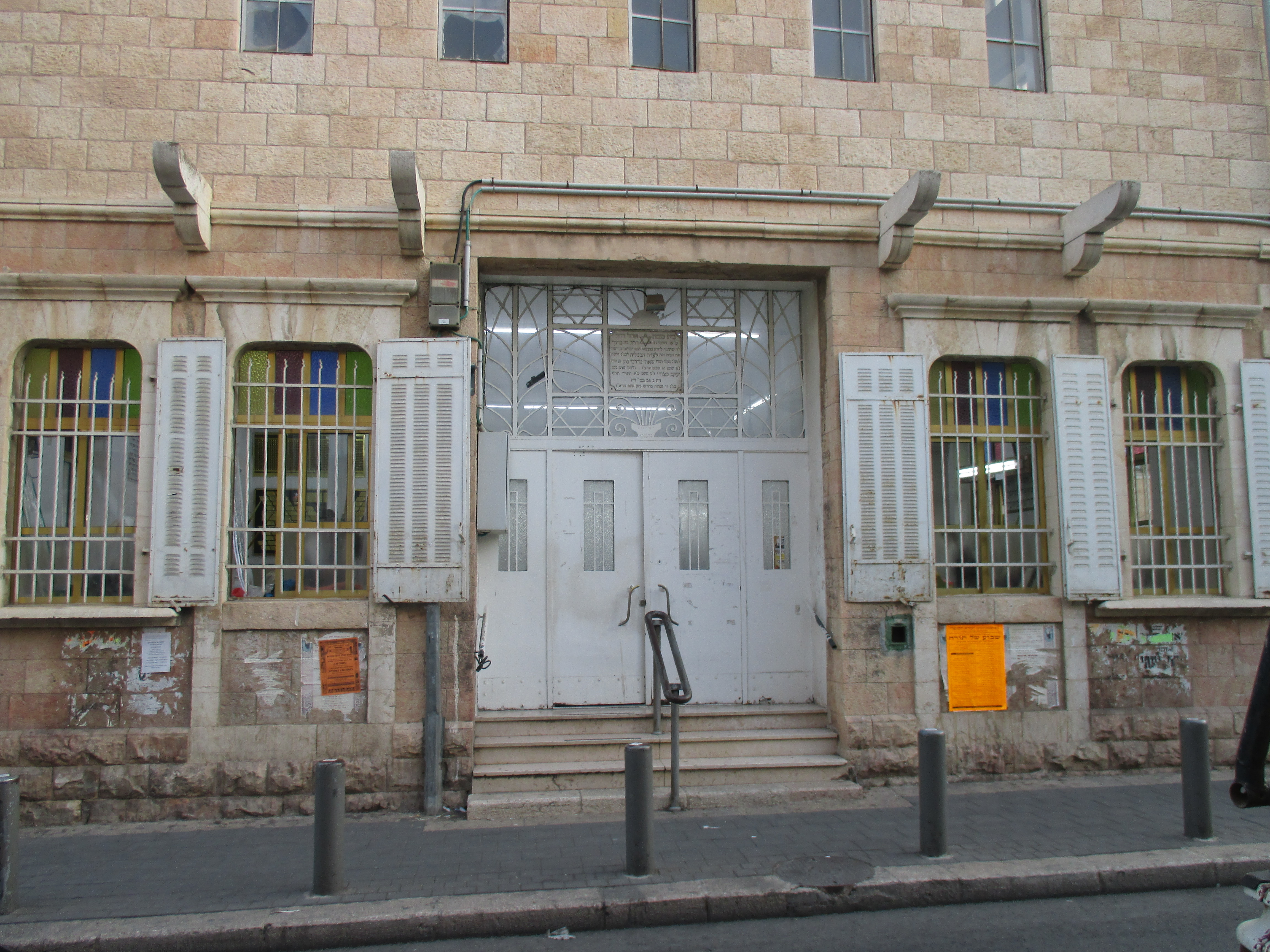 בית הכנסת אוהל רחל לעדת הבבלים ברחוב דוד ילין בירושלים